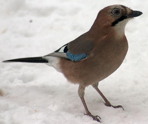 Garrulus glandarius Photo taken in Rumia, Poland by Adam Kumiszcza.